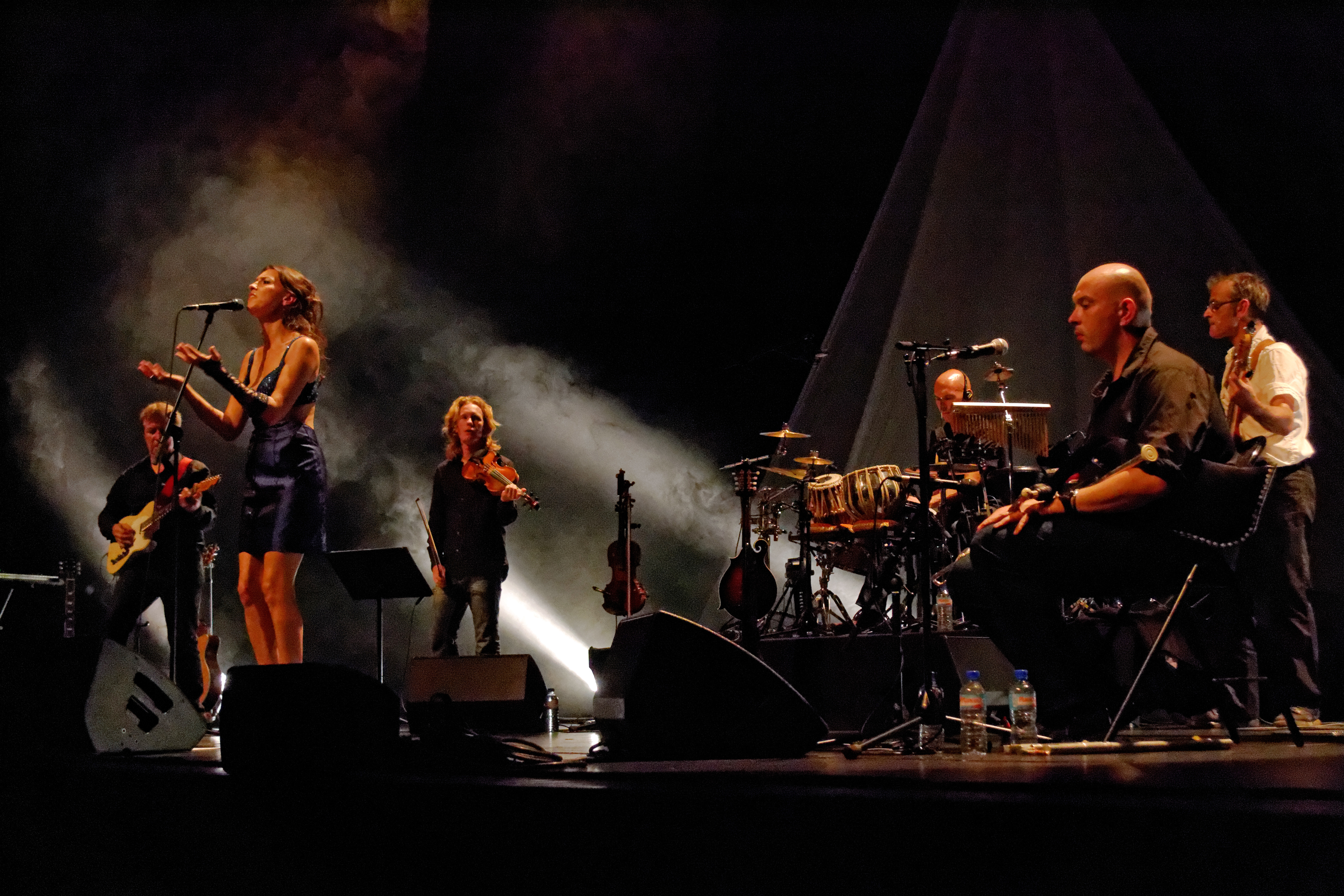 Gwennyn en concert au théâtre de Cornouaille lors du festival de Cornouaille à Quimper le 25 juillet 2014.